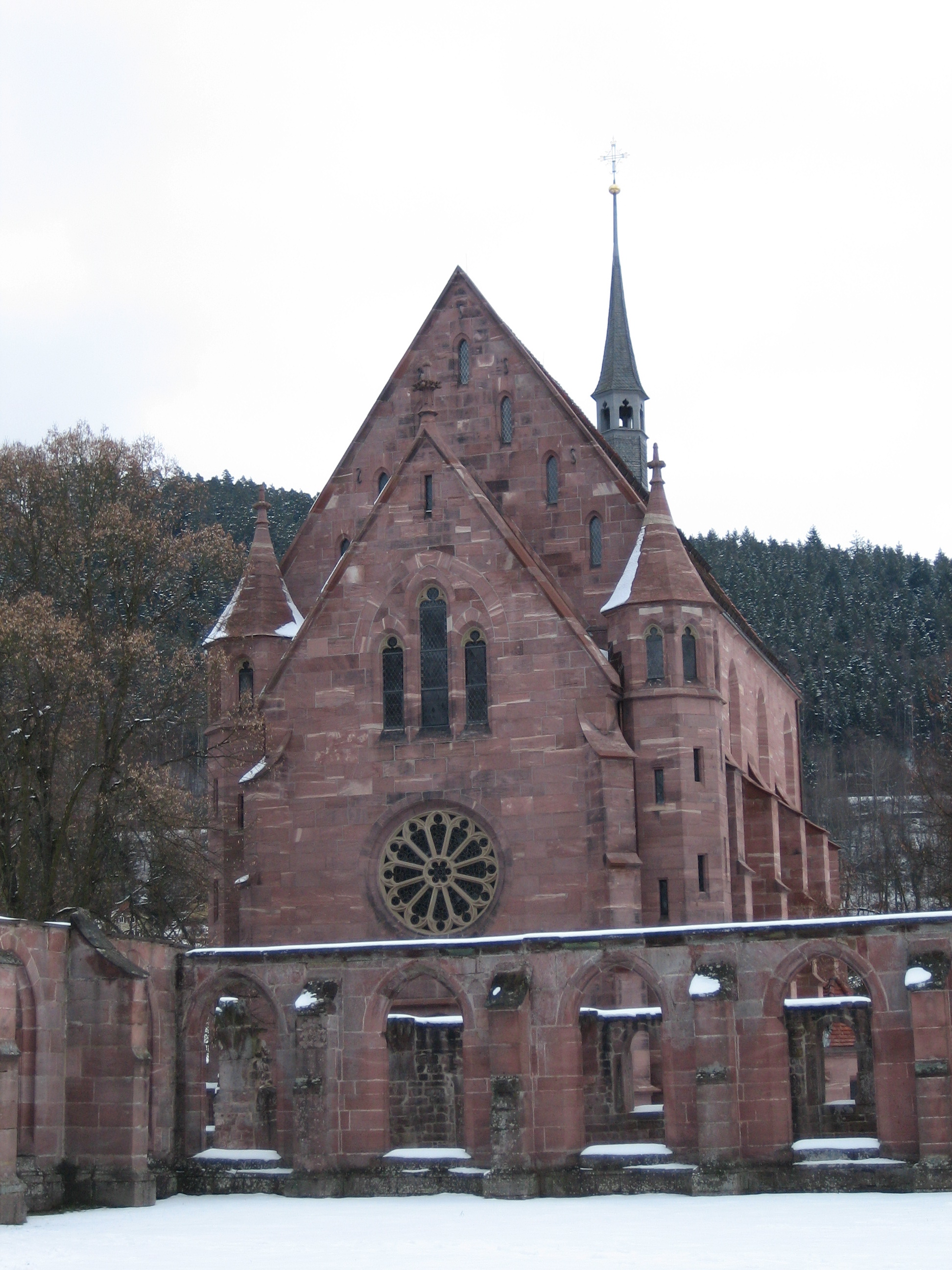 Kloster Hirsau: Kirche